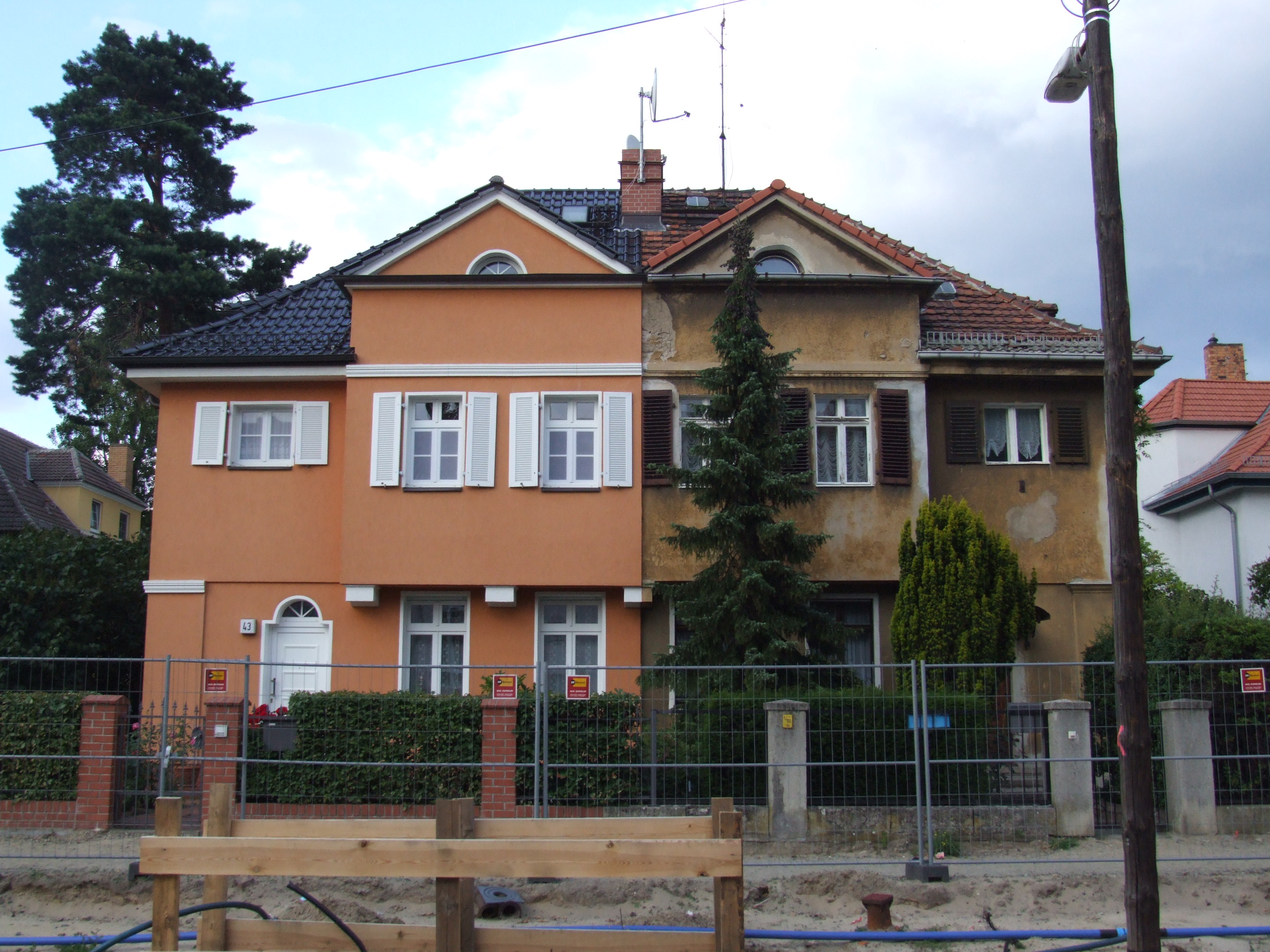 Sanierte und unsanierte Doppelhaushälfte in Berlin-Köpenick